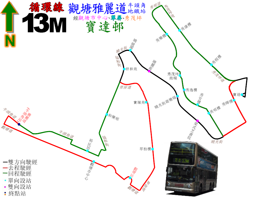 中文（香港）: 九巴13M線的走線圖